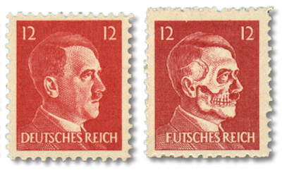 links: Originalbriefmarke der Reichspost von Adolf Hitler, rechts: Kriegspropagandafälschung (Hitler als Totenkopf) der Vereinigten Staaten von Amerika